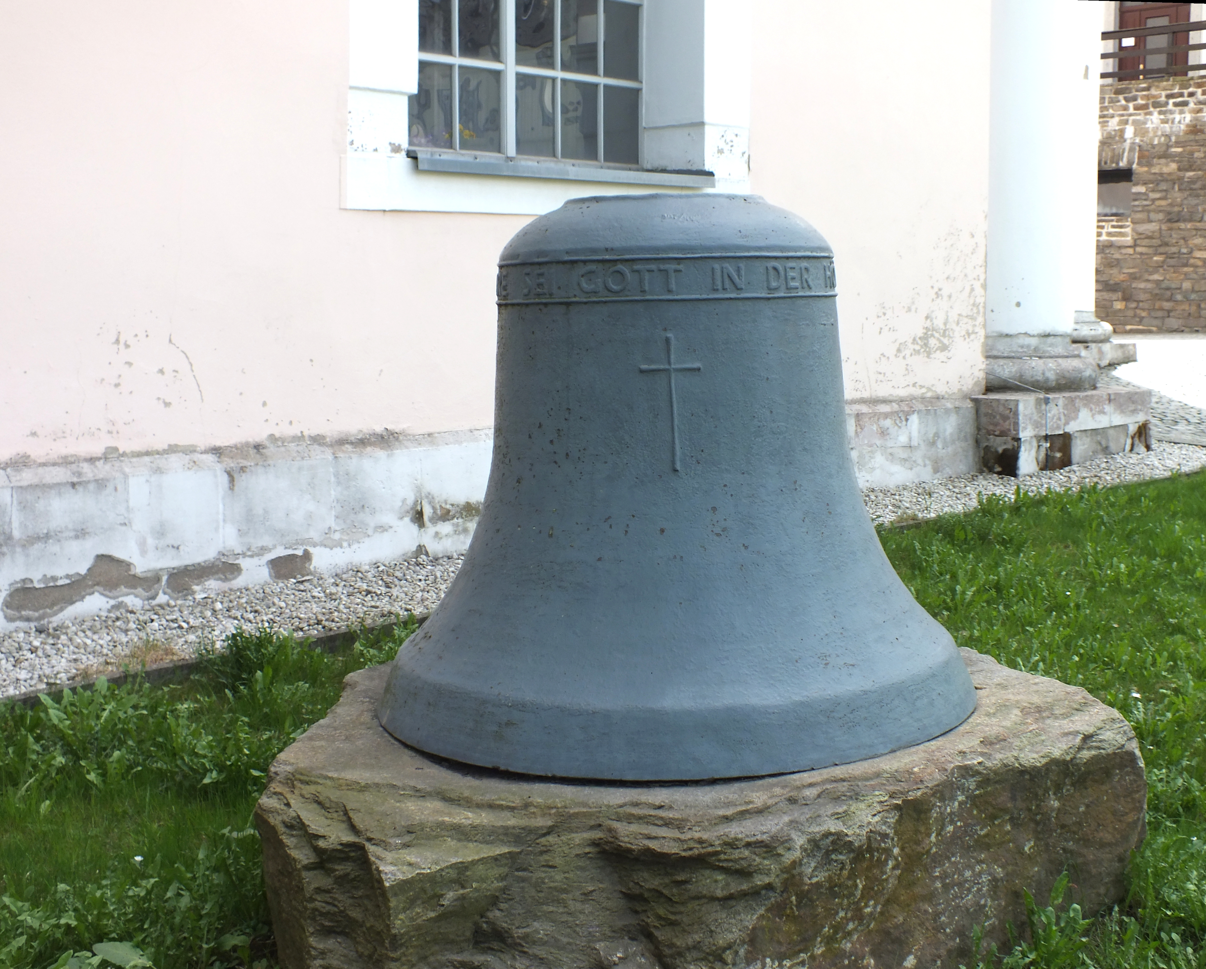 Nicolaikirche Grünhain